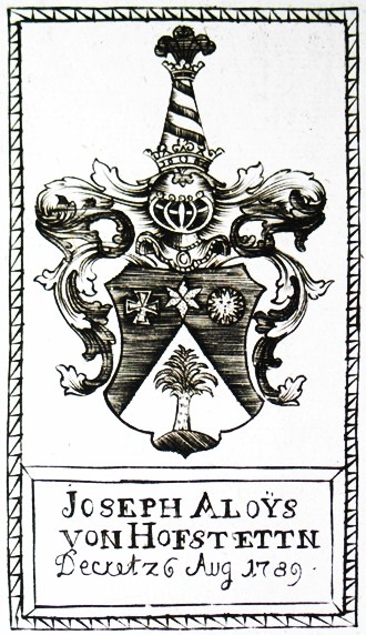 Wappen des Joseph Aloys von Hofstetten, kurbayerischer Brücken- und Wasserbaudirektor zu München